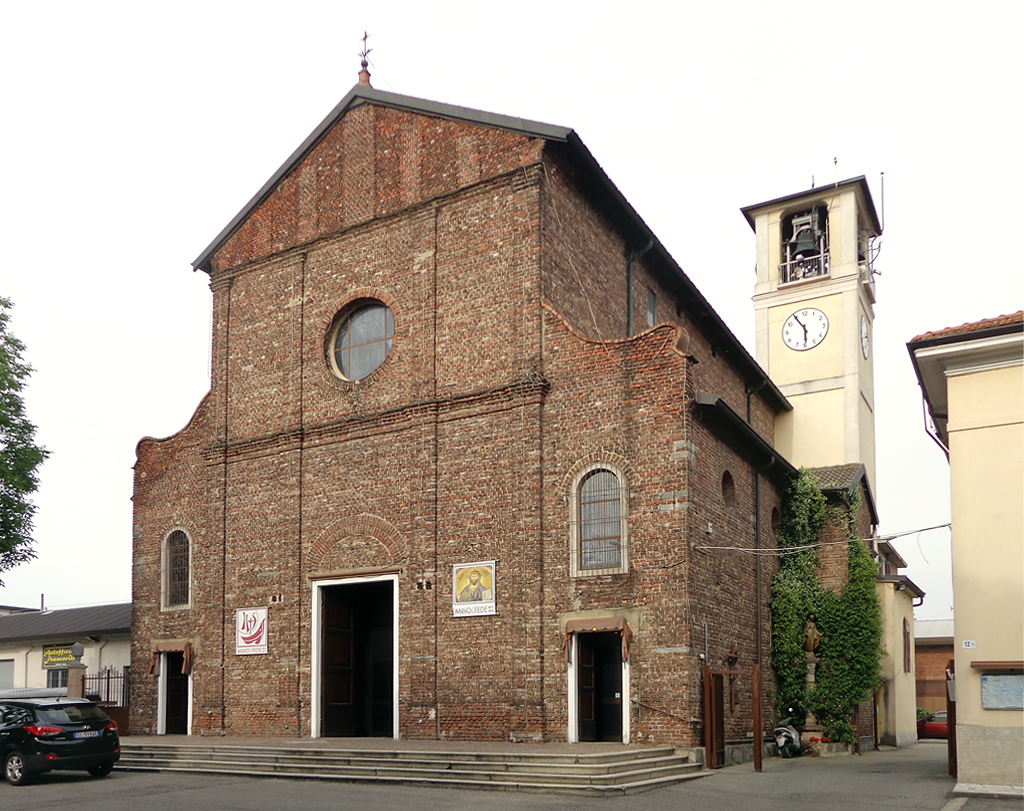 La chiesa parrocchiale di Sant’Ambrogio a Linate, frazione di Peschiera Borromeo.